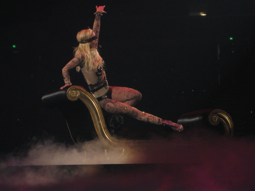 Cantando the Touch Of My Hand in Sacramento